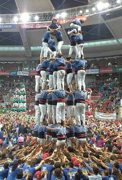 Primer 9 de 7 descarregat pels Marrecs de Salt. Concurs de Castells de Tarragona. 4 d'octubre de 2014